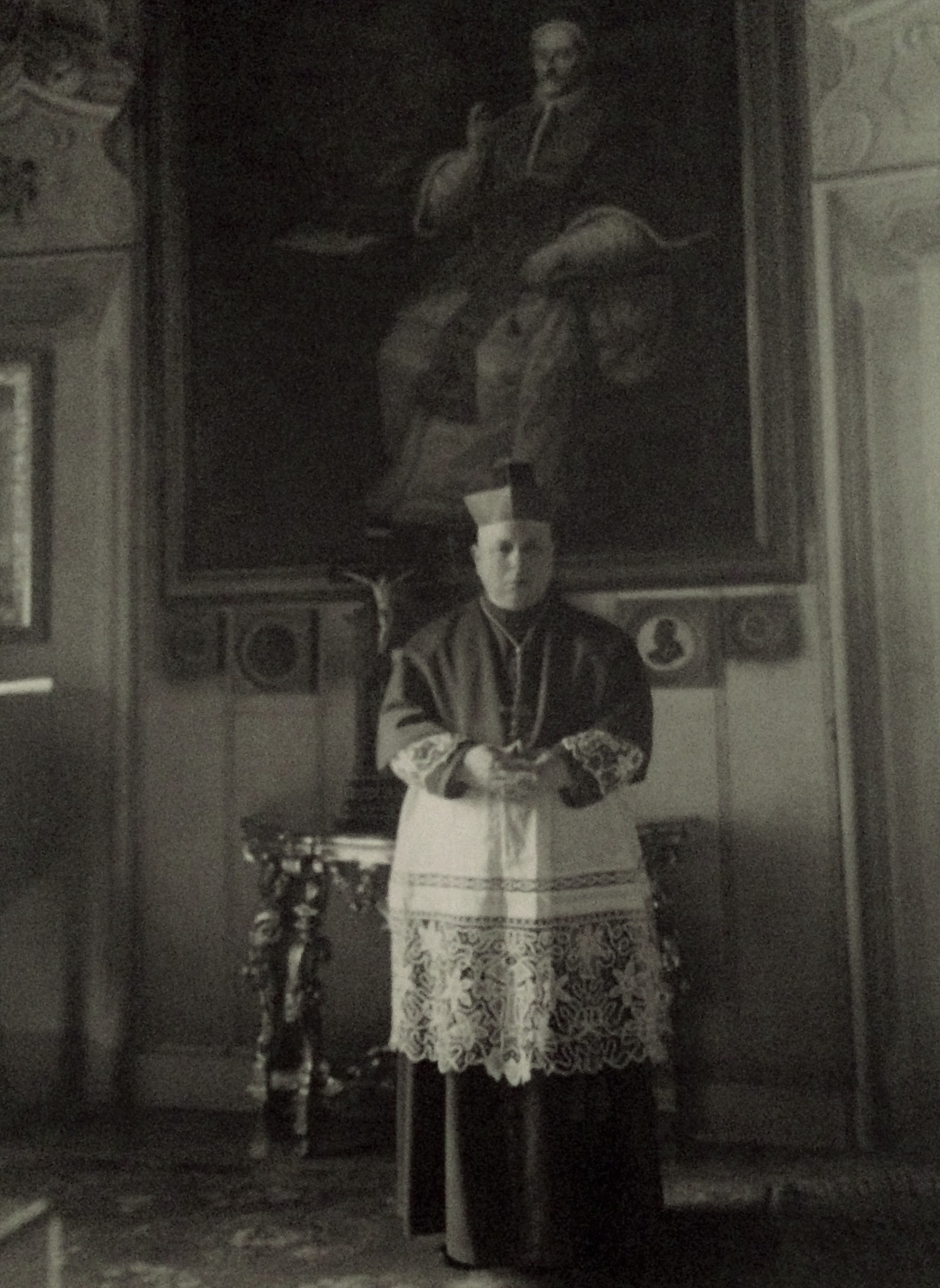 Mons. Bonomini Felice